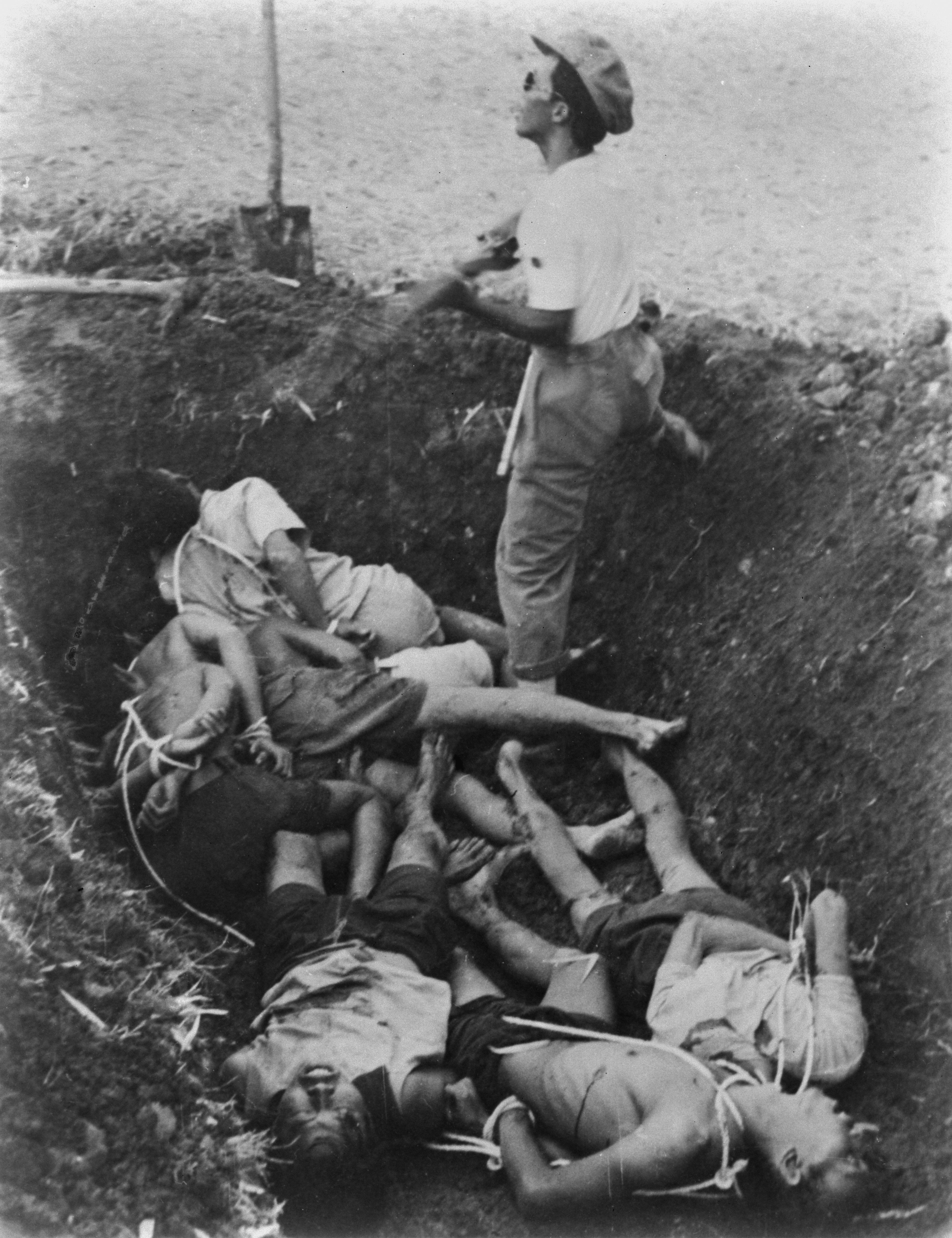 Collectie / Archief : Fotocollectie Dienst voor Legercontacten Indonesië Reportage / Serie : [DLC] Foto's gedode communisten door de TNI [gemaakt te Madioen, september 1948] Beschrijving : De dode lichamen van de geboeide groep mannen in de greppel. Staand de beul met geweer en zonnebril. Boven staat een schop in de grond gestoken Datum : september 1948 Locatie : Indonesië, Nederlands-Indië Fotograaf : Fotograaf Onbekend / DLC Auteursrechthebbende : Nationaal Archief Materiaalsoort : Negatief (zwart/wit) Nummer archiefinventaris : bekijk toegang 2.24.04.02 Bestanddeelnummer : 8809